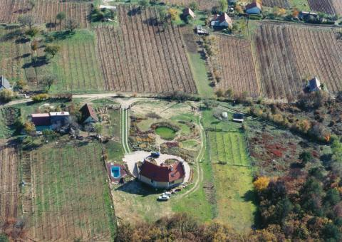 Balatonakali.